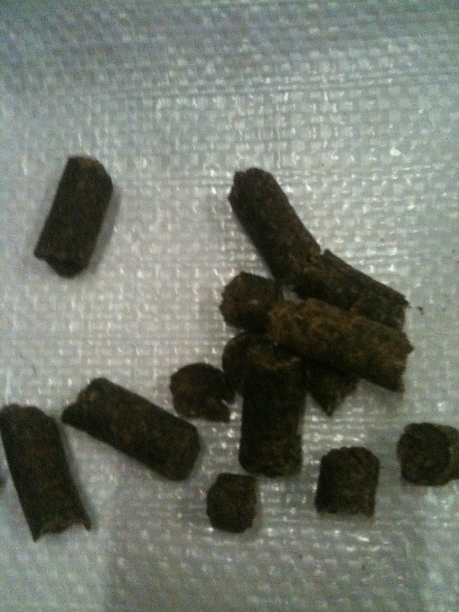 Melasseschnitzel